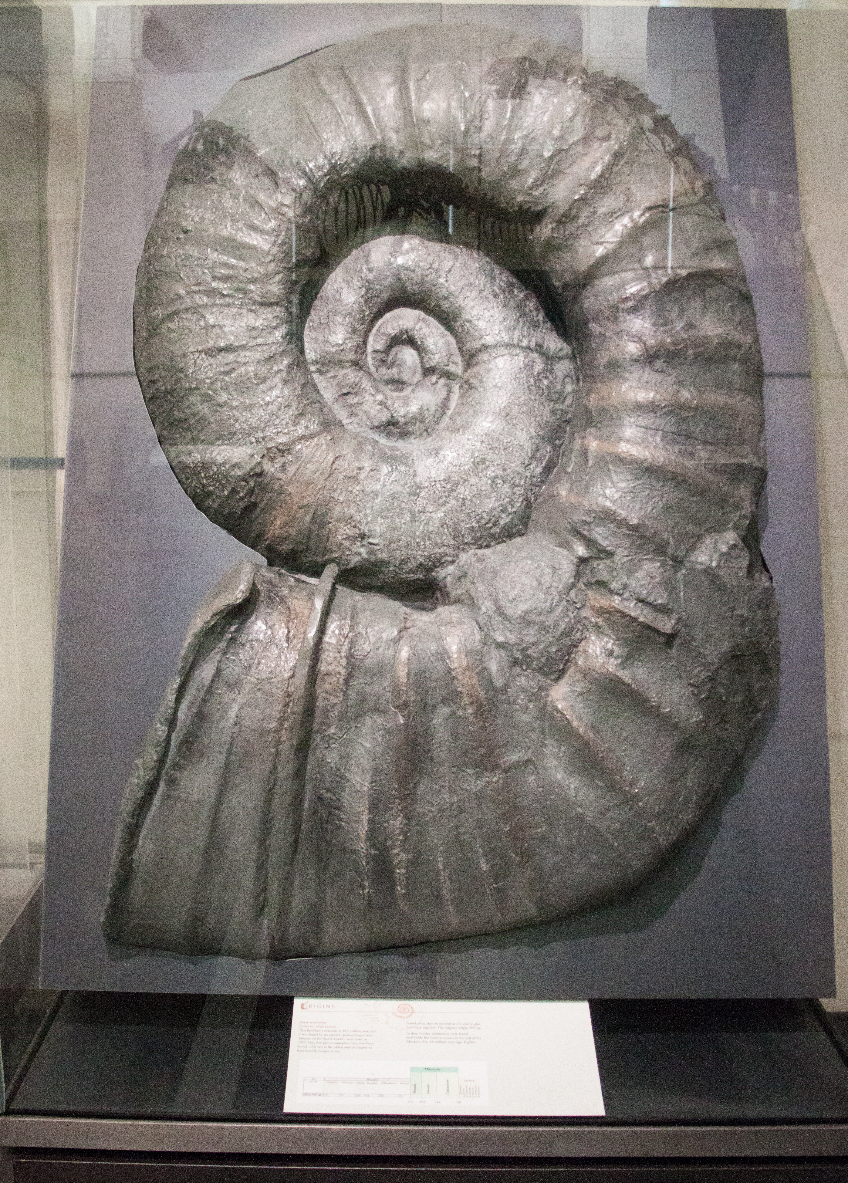 Giant ammonitelabel QS:Len,"Giant ammonite" label QS:Lhu,"Óriás ammonita kövülete"